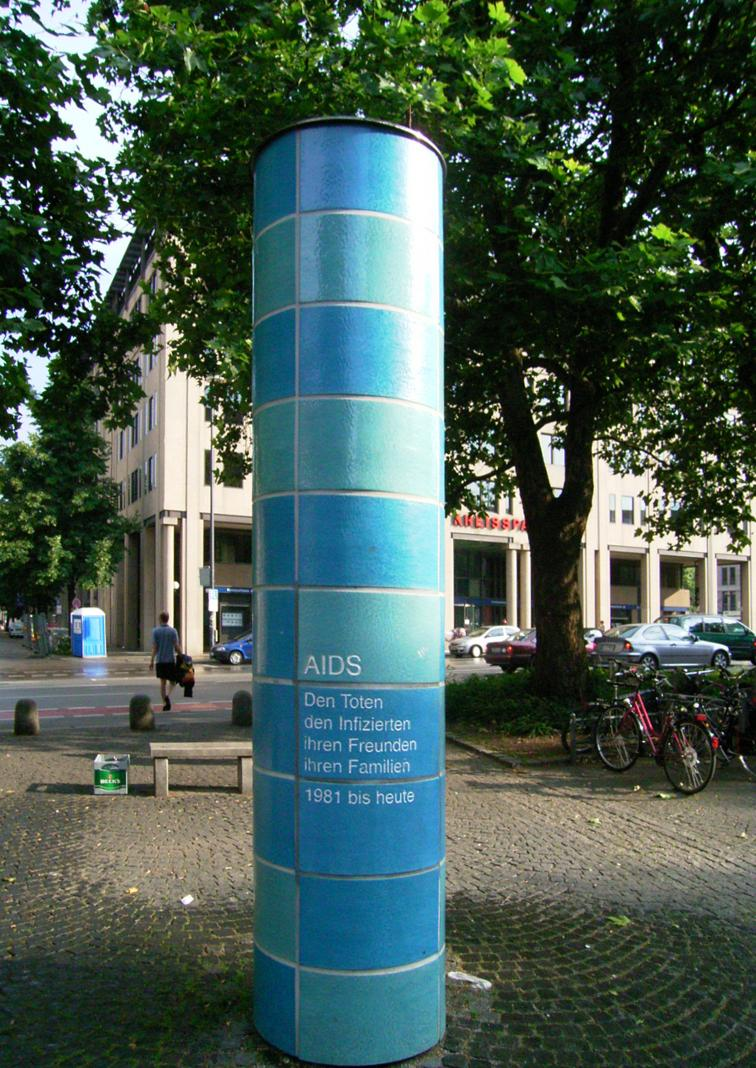 AIDS-Memorial (München).JPG Blaue Säule, Sendlinger Tor, Denkmal